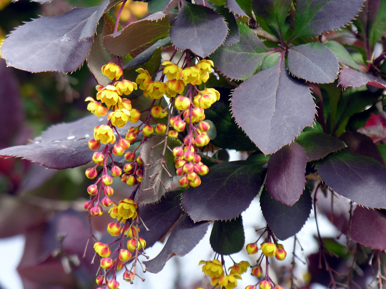 Paprastasis raugerškis, var. atro-purpurea (Berberis vulgaris) Šeima. Raugerškiniai (Berberidaceae) Foto: User:Algirdas, 2006 m. gegužės 26 d.